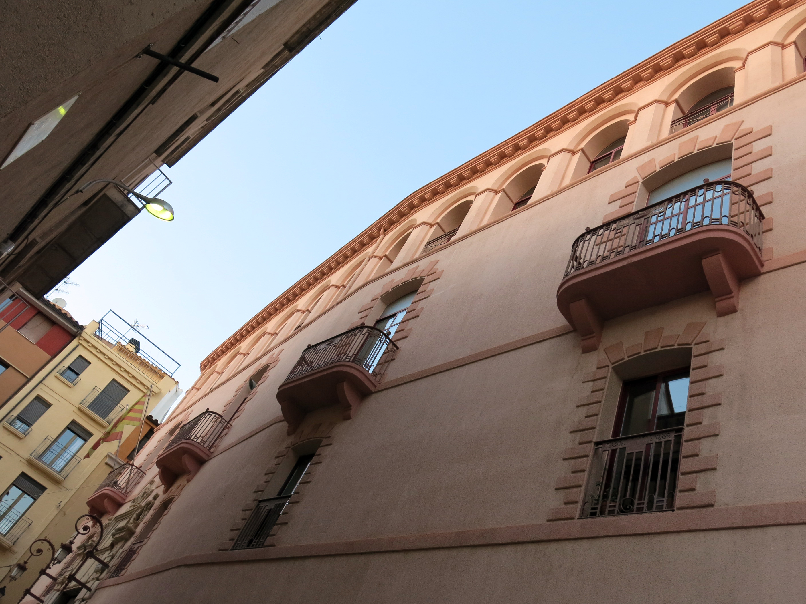 Jutjats (Tortosa)